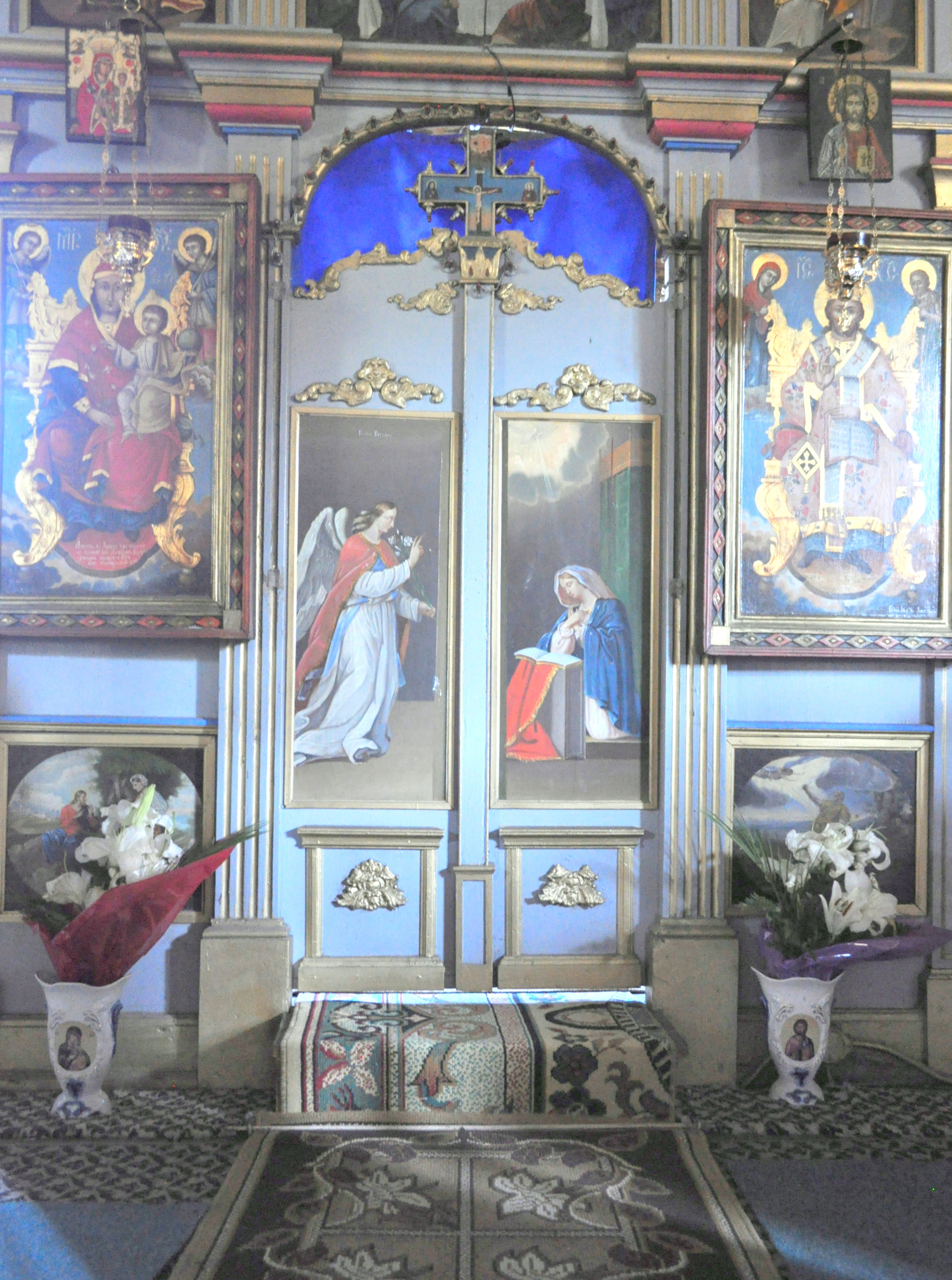 Biserica ortodoxă „Sfânta Treime”